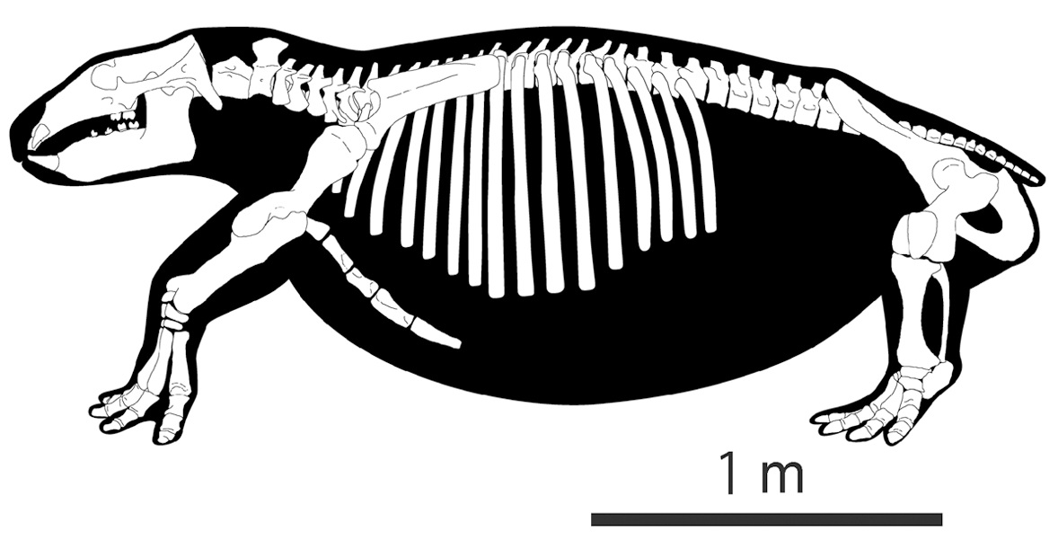 Skeletal illustration of Behemotops